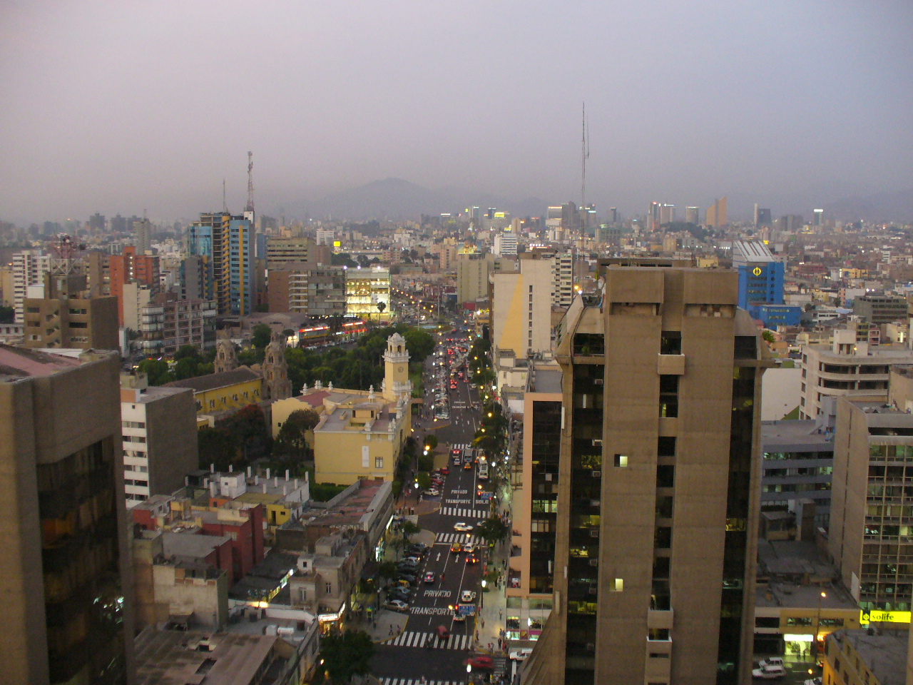 O distrito mais rico de Lima. Vista do outro lado do Hotel Las Americas.